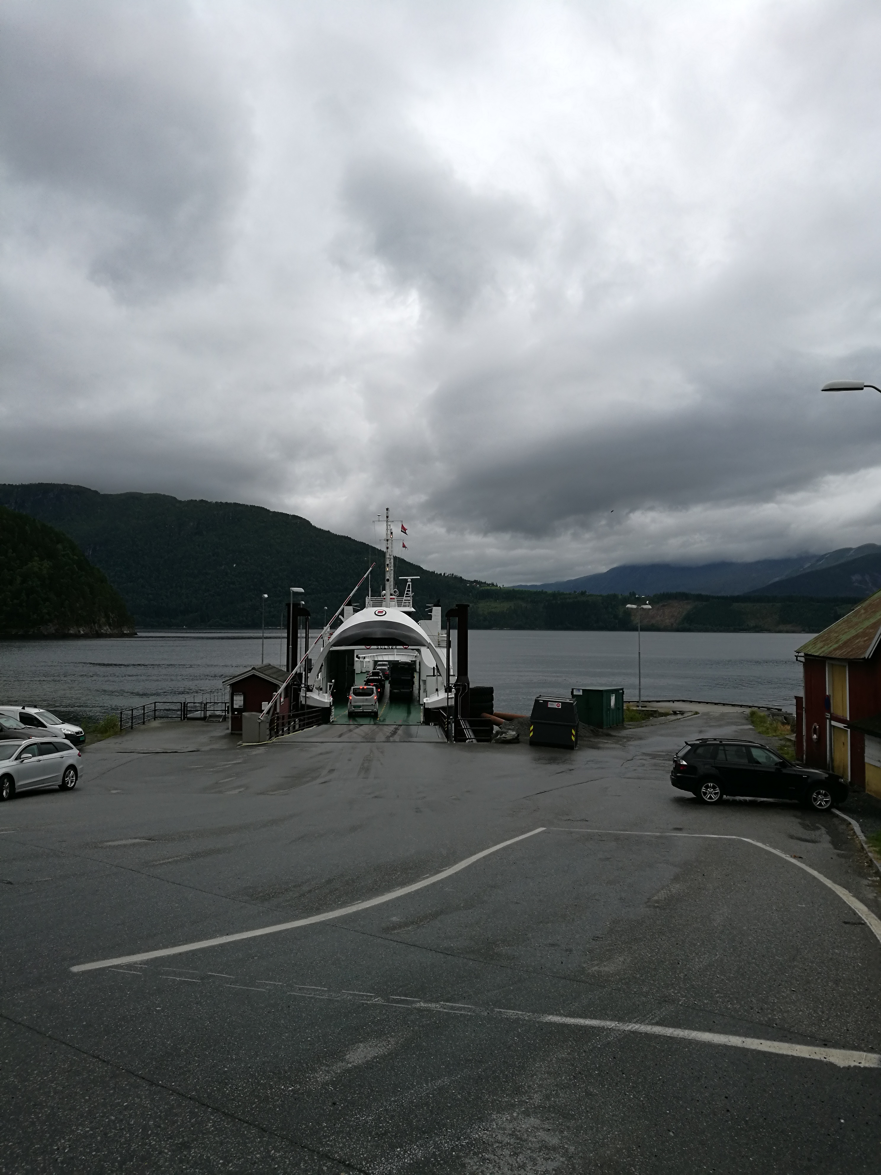 Kvanne ferjekai i Surnadal kommune på sambandet Kvanne–Rykkjem over Stangvikfjorden på Fylkesveg 670.